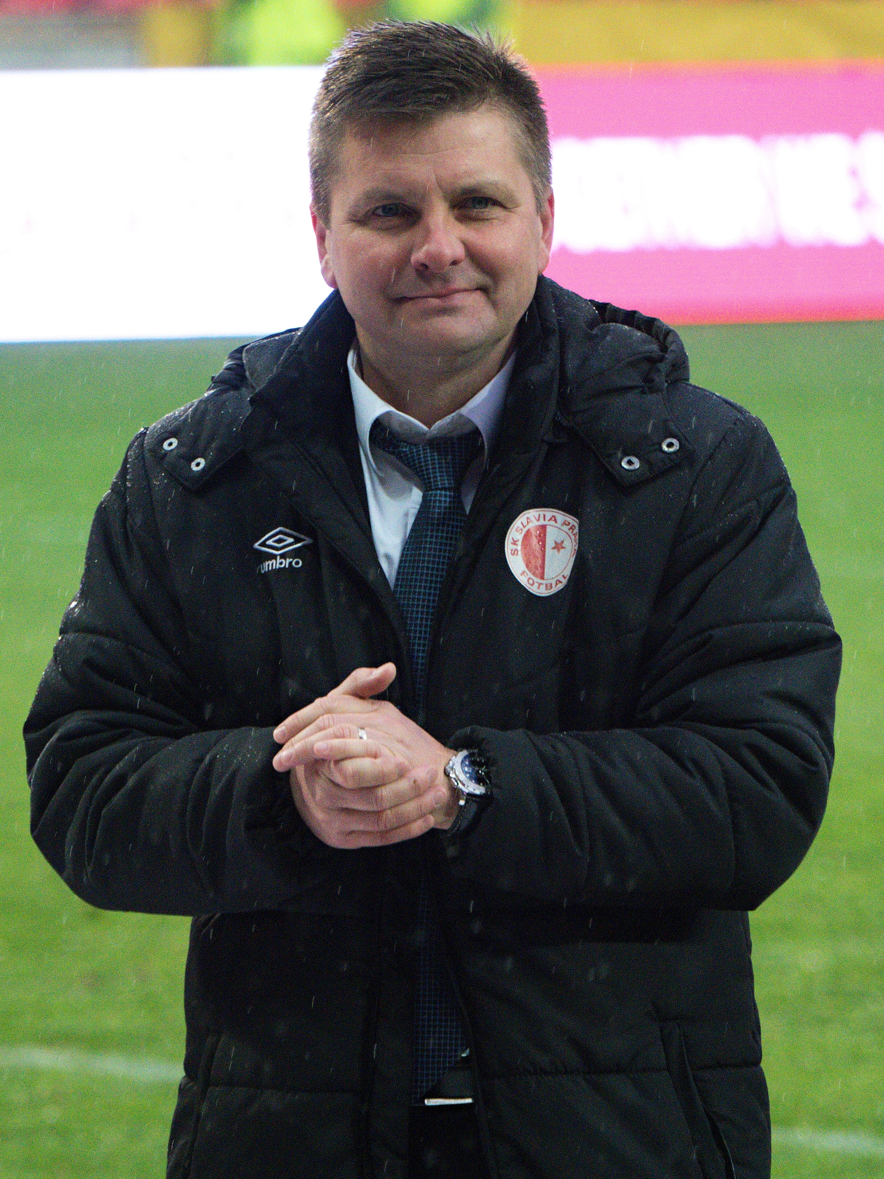 Dušan Uhrin ml.